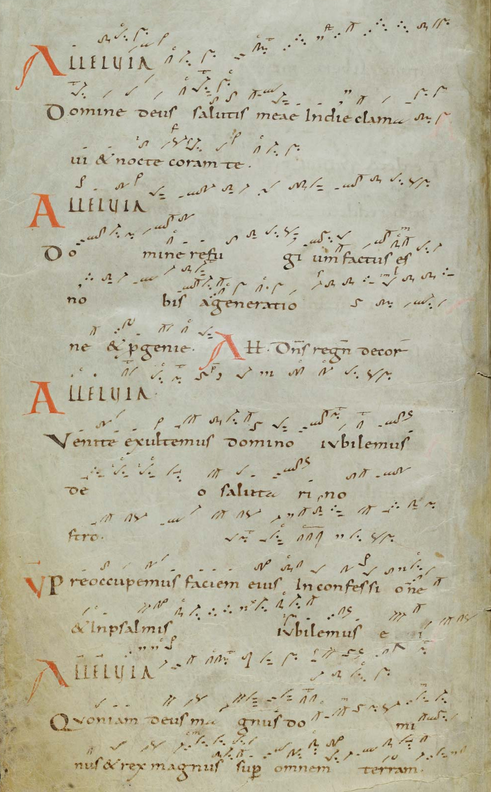 Alleluia-Verse aus dem St. Galler Cantatorium (Codex Sangallensis 359)